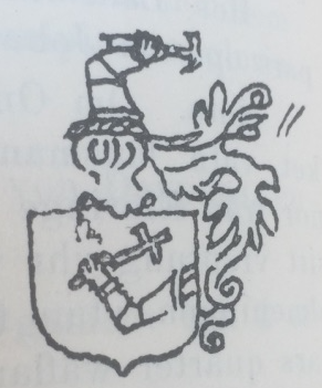 Heraldiskt vapen för Isak Behm (död 1630).